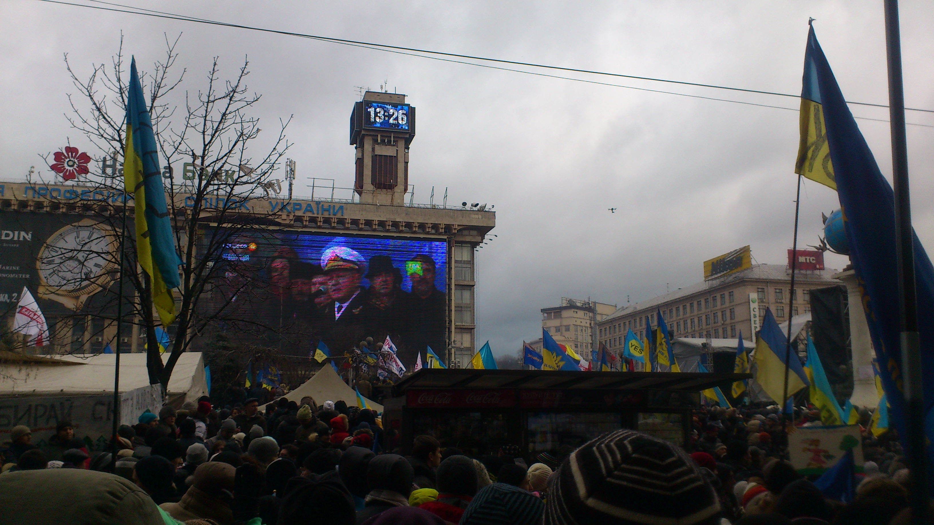 Тенюх на Євромайдані: На сцену на Євромайдані вийшов екс-головнокомандувач військово-морських сил України адмірал Ігор Тенюх, який зачитав присягу Україні і закликав не піддаватися на провокації, — в натовпі скандували "Армія з народом!".